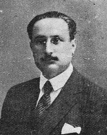 Leonardo Rodríguez, foto en Vida Gallega, 1919